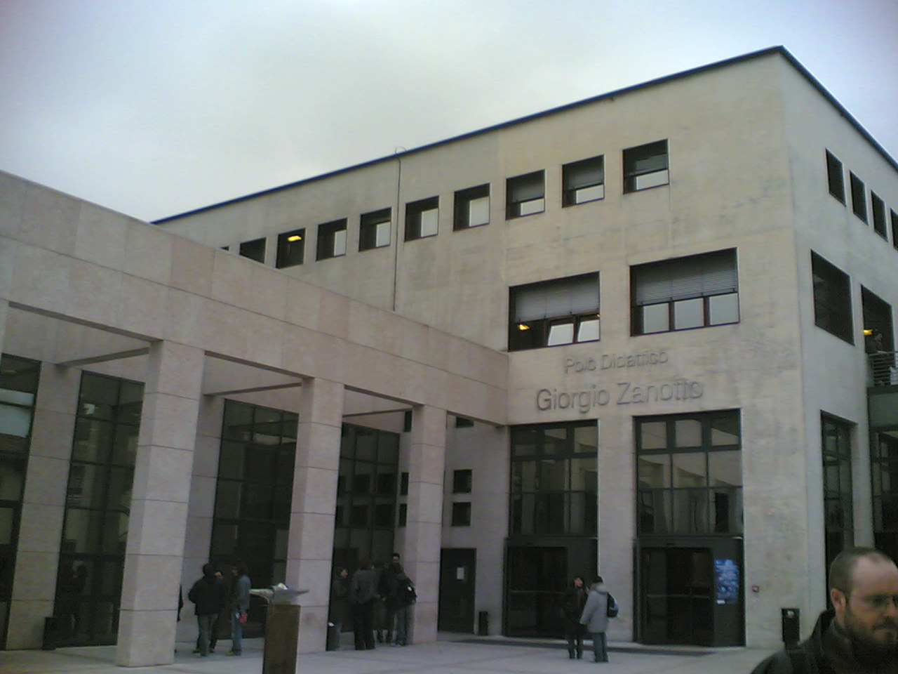 Entrata in università di Verona.